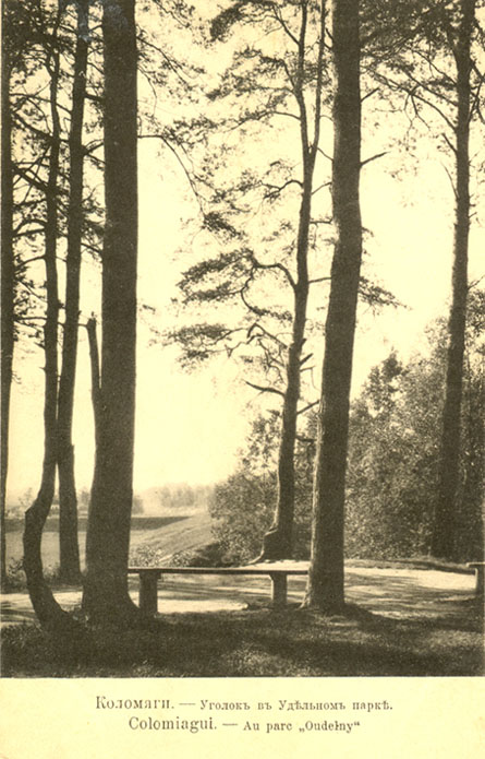 Colomiagui. Au parc "Oudelny"